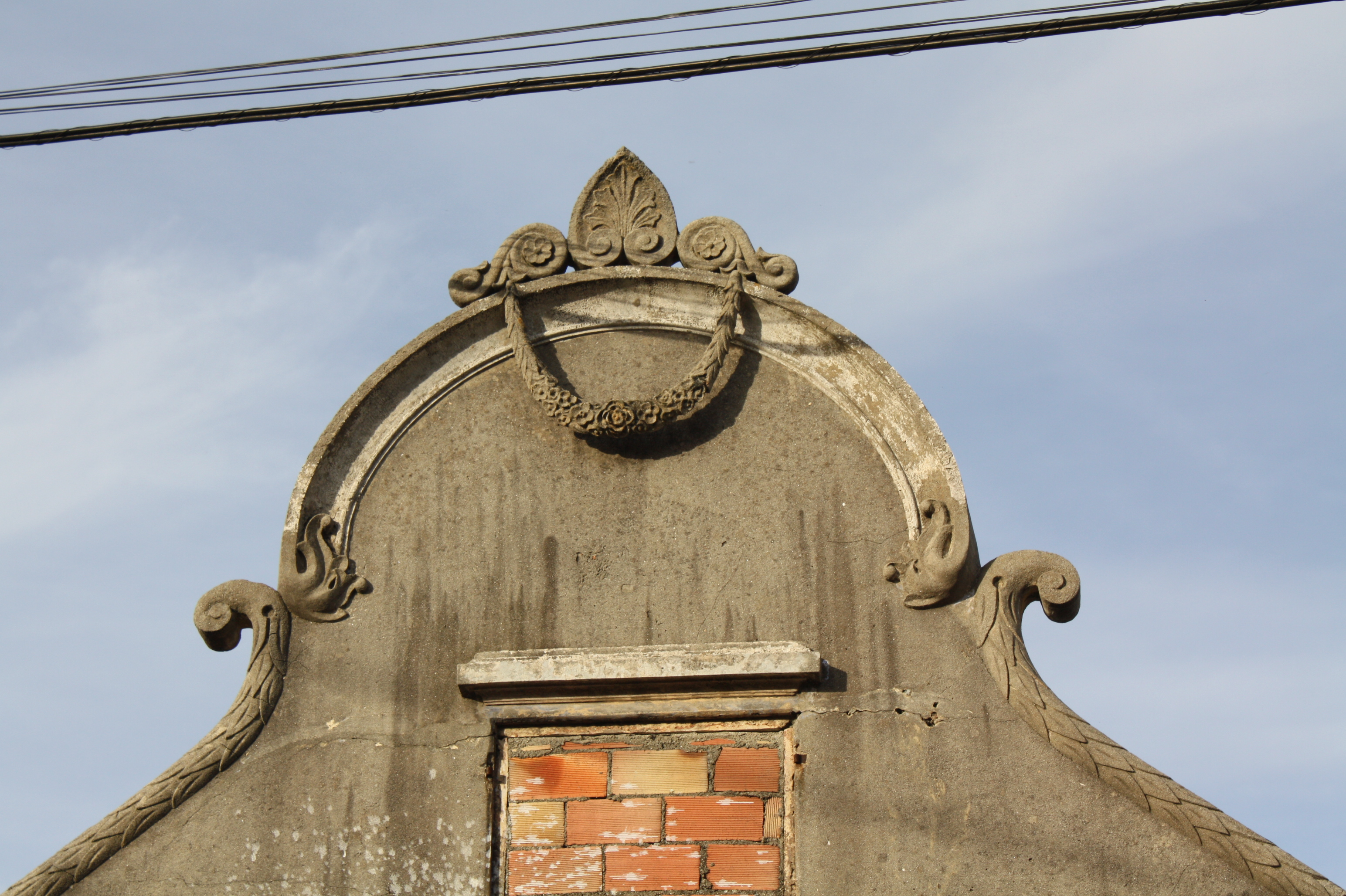 Fachada dun vello edificio modernista no Grove, cunha grilanda e unha palmeta